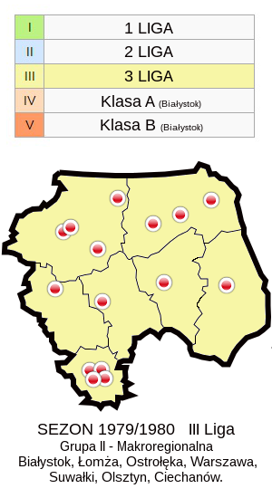 Jagiellonia w sezonie 1979/80 - mapa